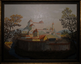 Hrad Dívčí kámen, olej na plátně 110x85 cm